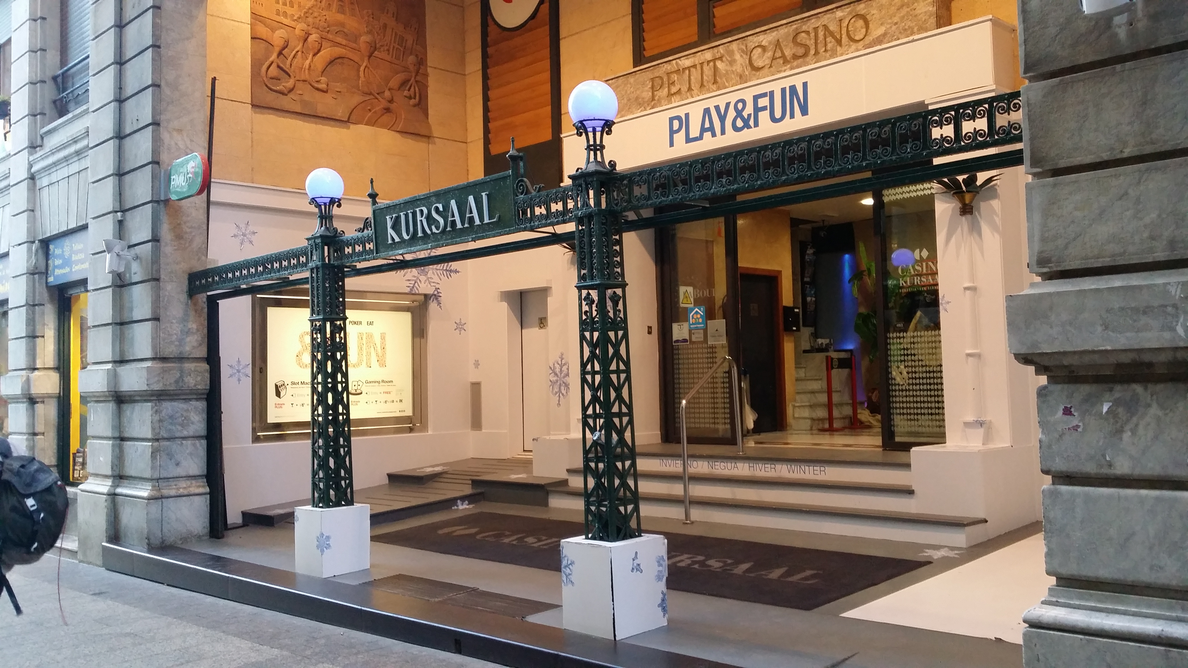 Petit Casinoren eraikina Donostia, gaur egun Kursaal kasinoa.